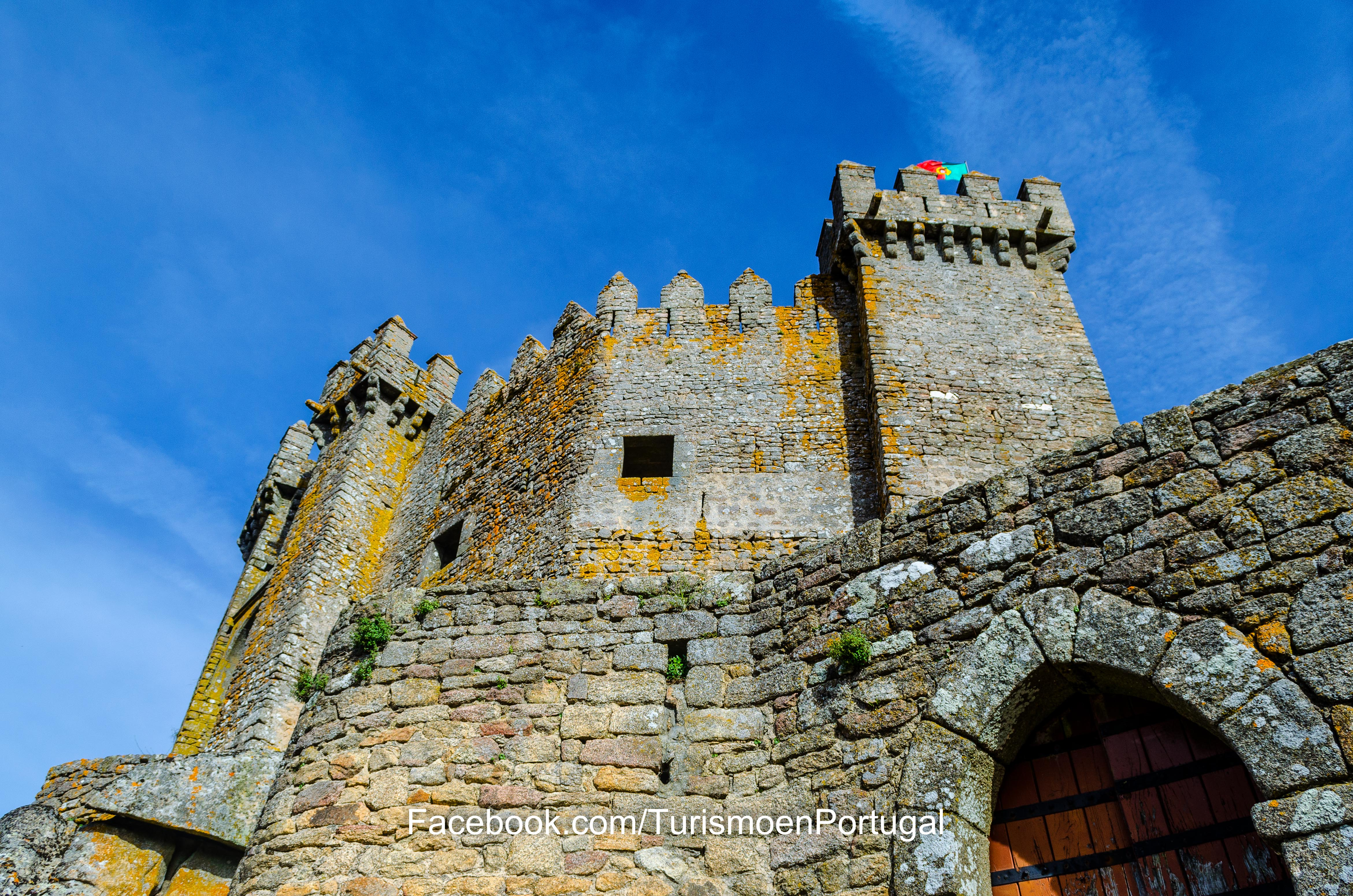 Penedono castle